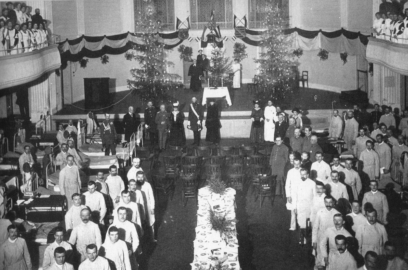 Das Reserve-Lazarett im großen Schützensaal in Meiningen Weihnachten 1914.